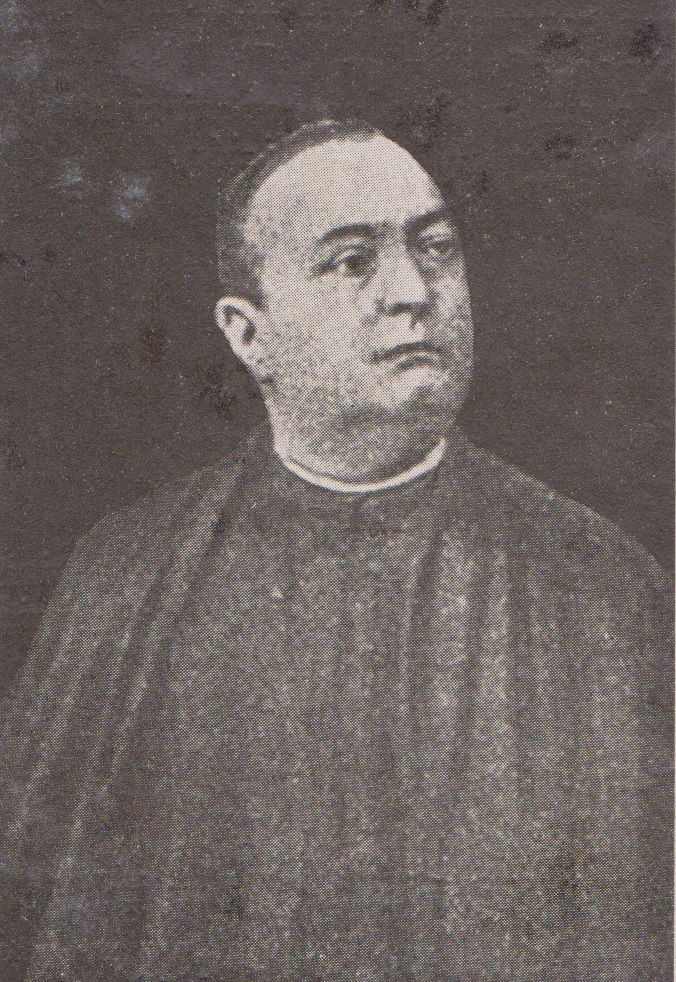 José Roca y Ponsa (1852-1938)